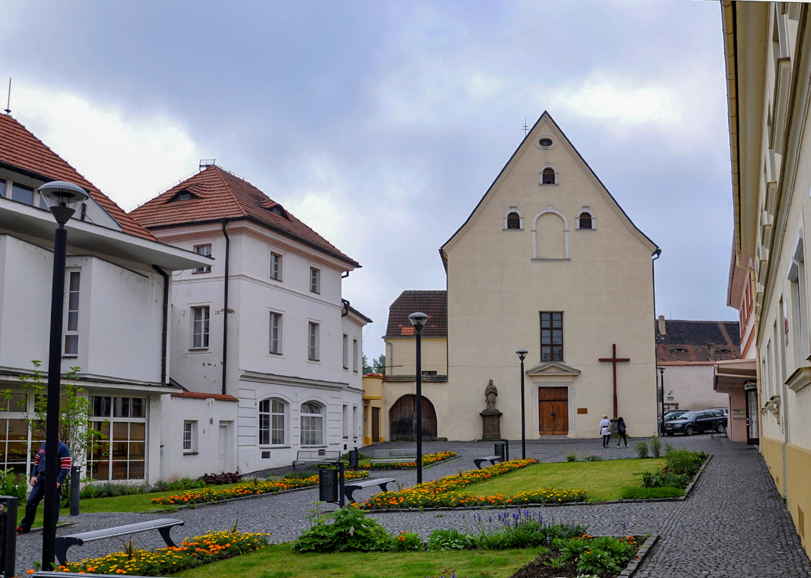 Litoměřice, kostel svaté Ludmily